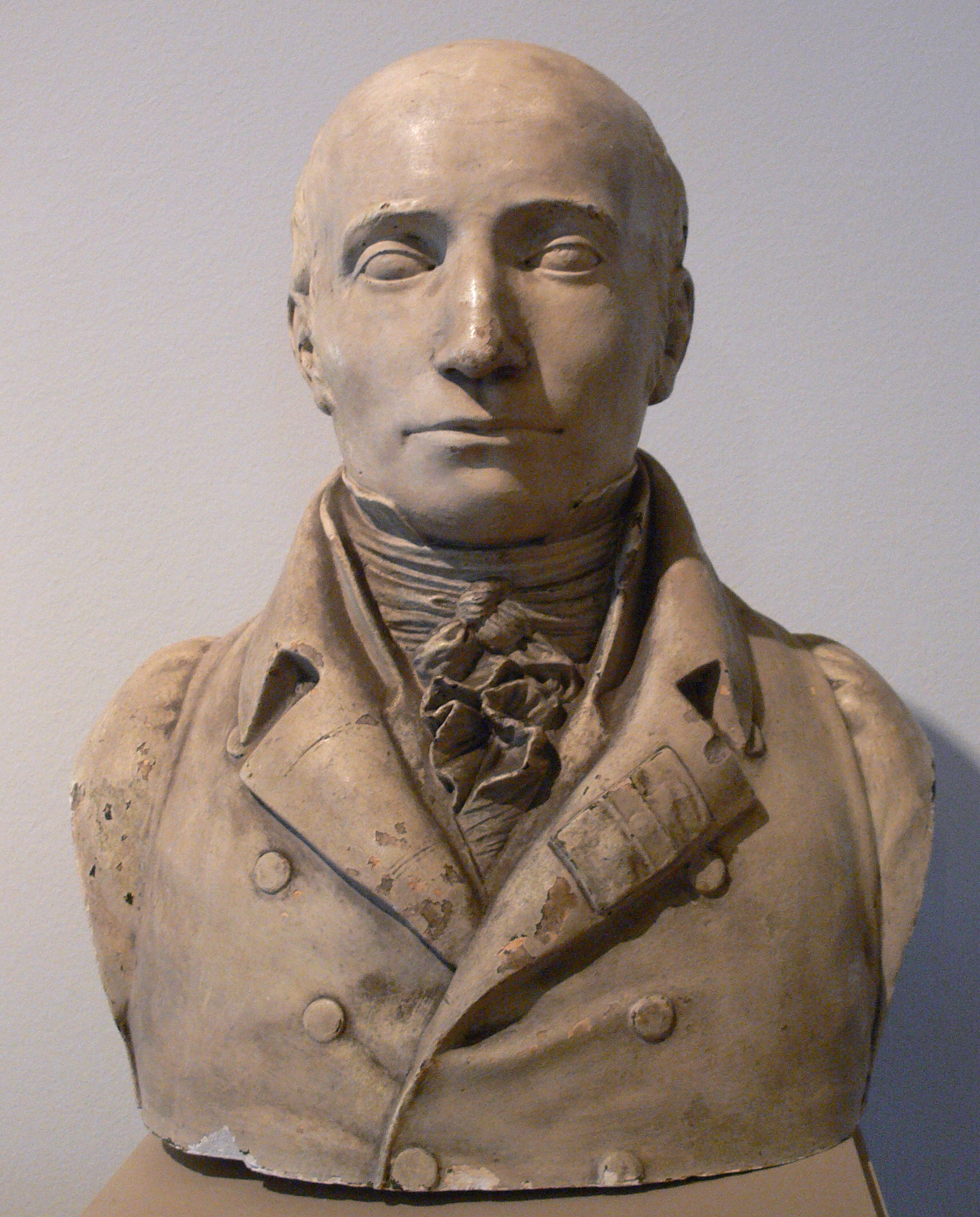 Portraitbüste Christian Gottfried Becker (1771–1820), Gips, Künstler unbekannt, um 1865 Schloßbergmuseum Chemnitz